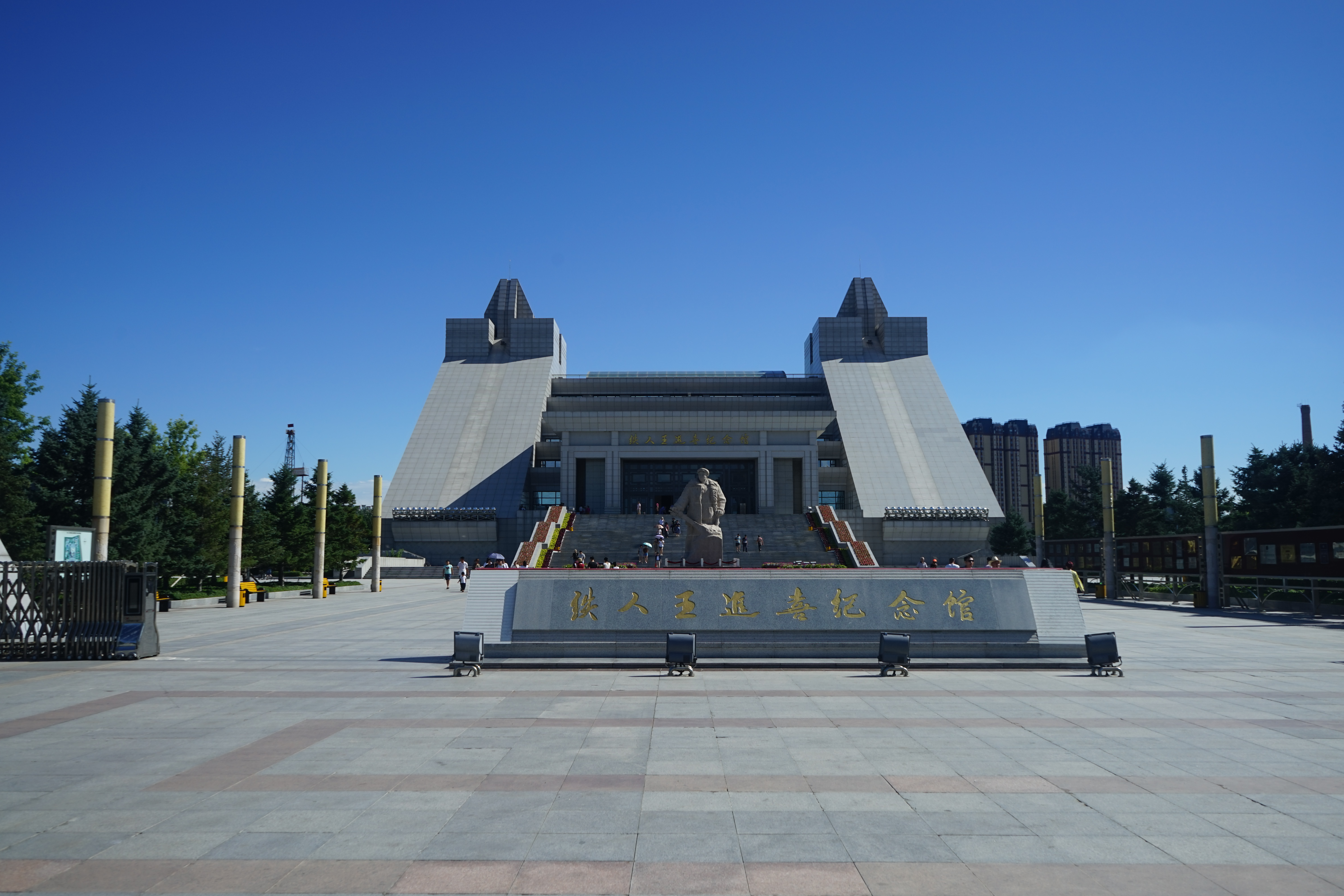 中文（中国大陆）: 大庆铁人王进喜纪念馆